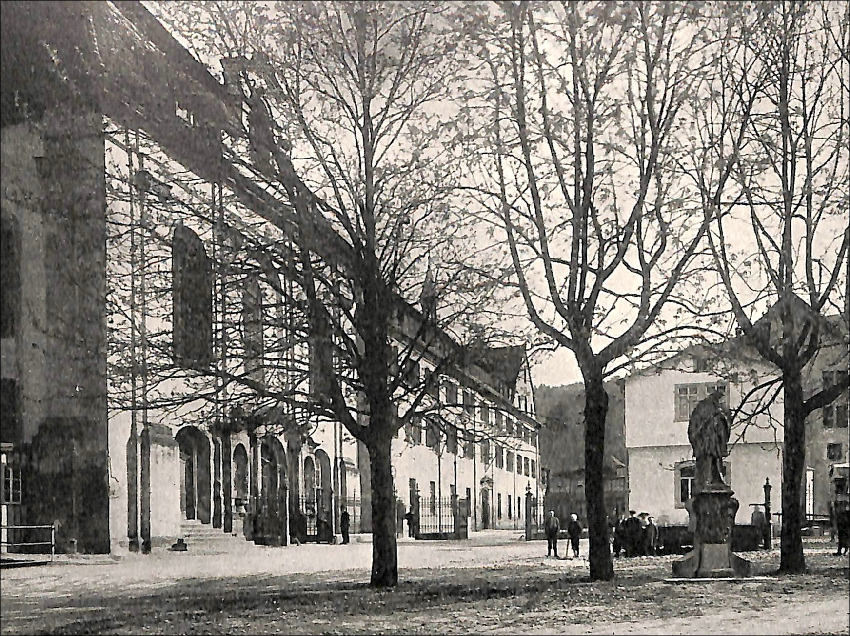 Oberndorf - Ortsansicht mit Gebäuden der Waffenfabrik Mauser AG.